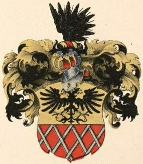 Brüggeni suguvõsa aadli- ja parunivapp